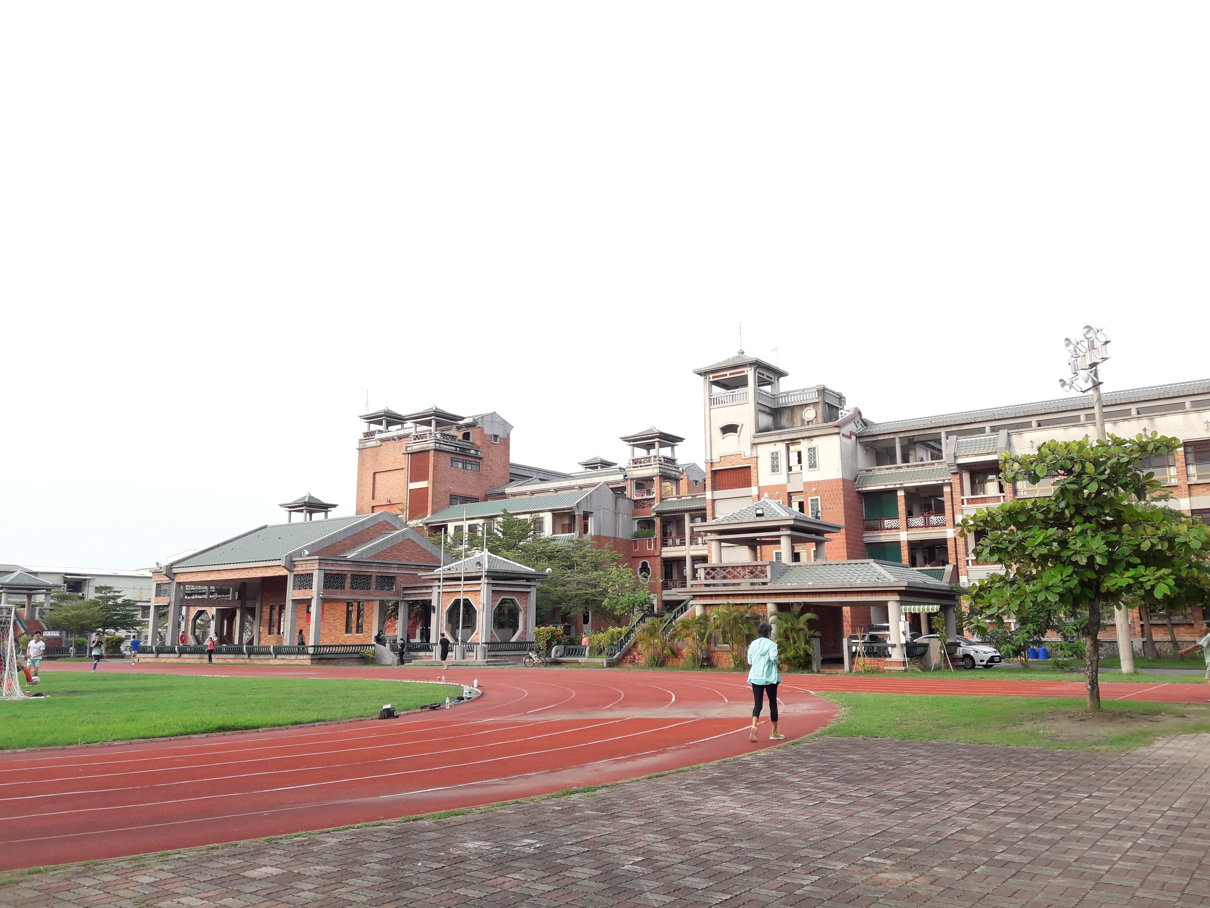 和順國中操場。後排建築物右起文昌樓、大成樓，大成樓前為涼亭、講話臺。